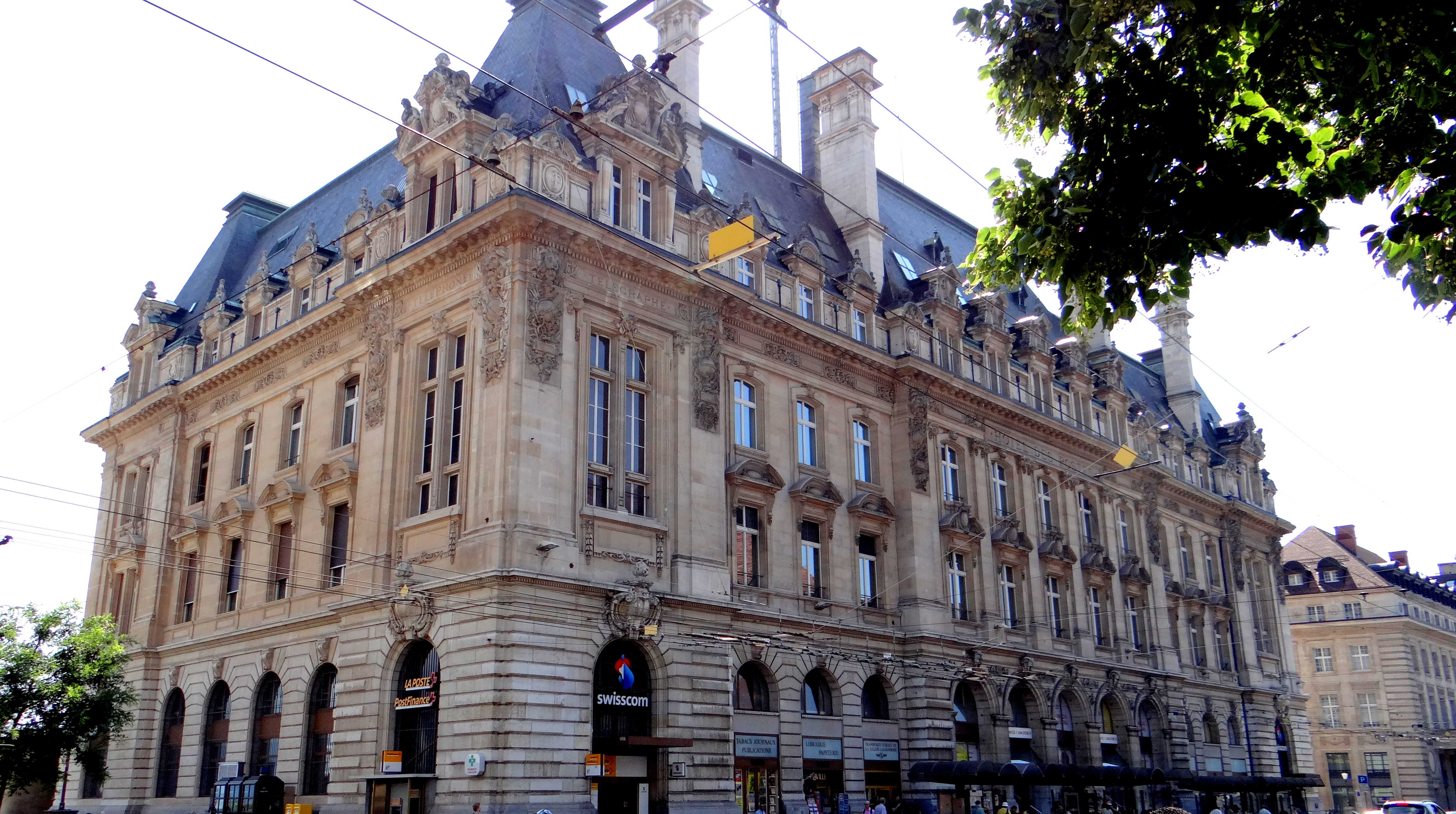 Hôtel des Postes